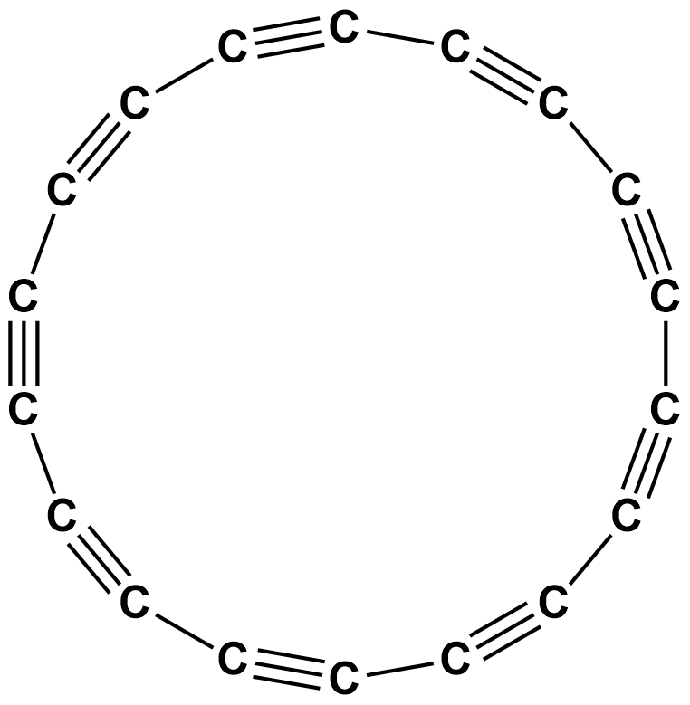 Polyynic cyclo[18]carbon